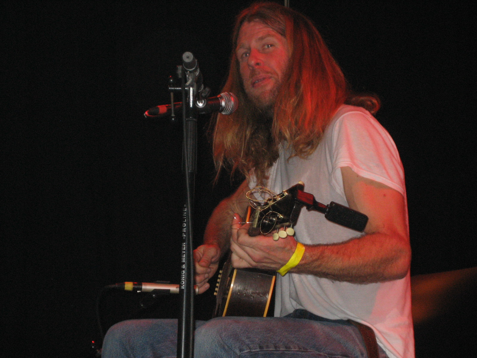 Grayson Capps in Paradiso (Amsterdam)